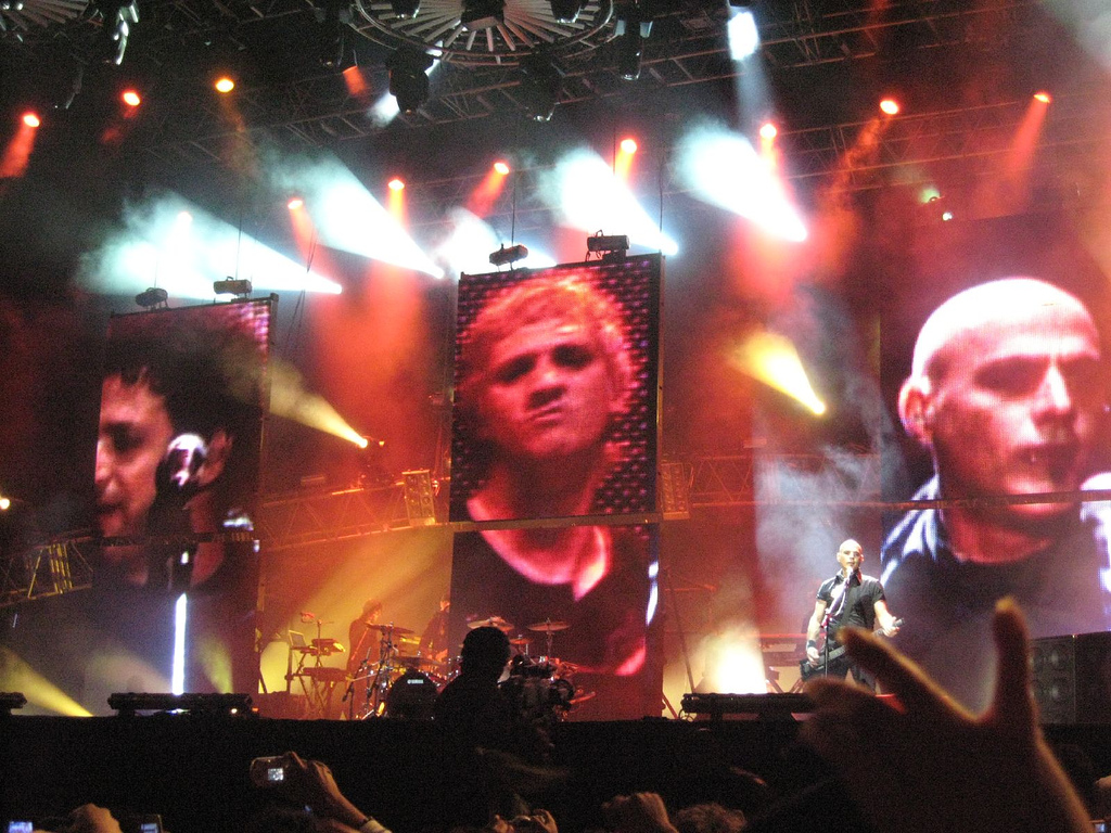 Recital de Soda Stereo en Lima, Perú. La gente vibró con temas como En la ciudad de la furia.